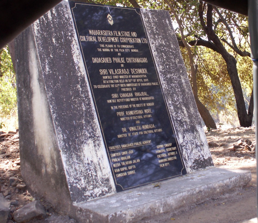 Plaque at Film City Mumbai entrance